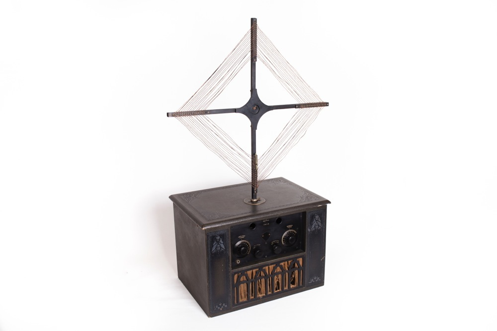 הרדיו הראשון של לי דה-פרוסט